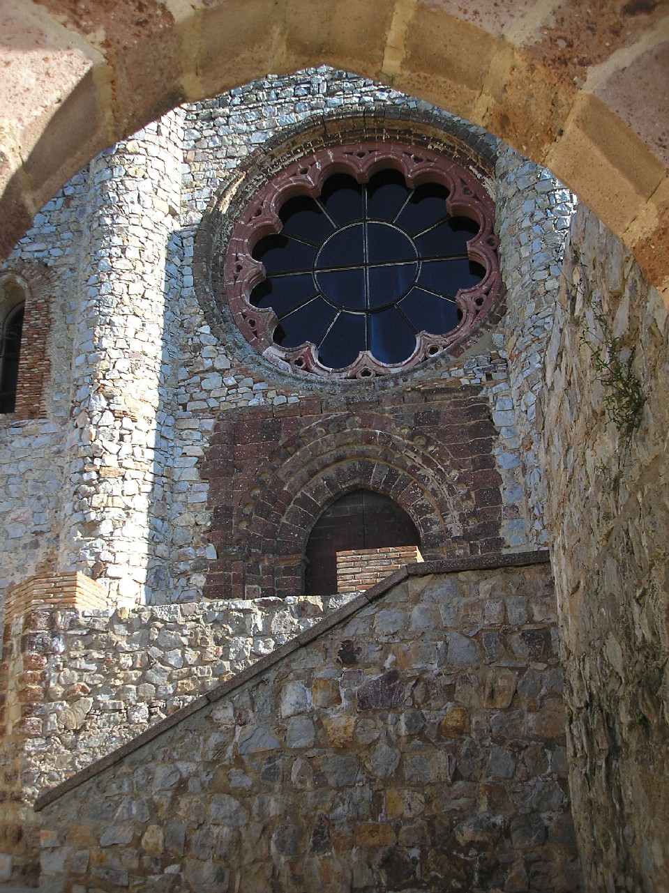 taken by valdoria 2006